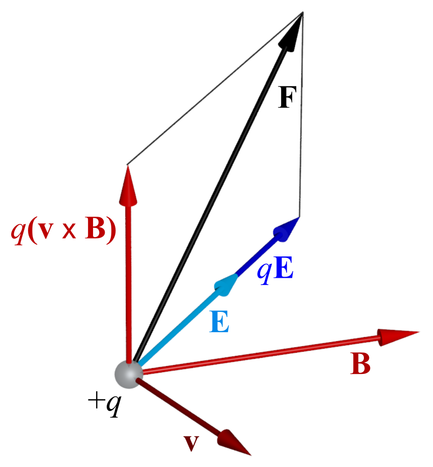 Lorentzkraften